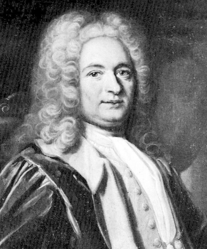 Pehr Scheffer President för Svea hovrätt